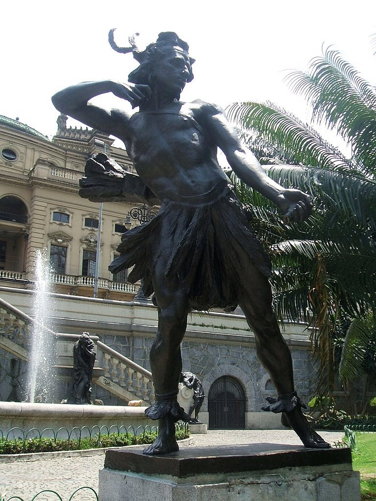 Guarany, obra de Luigi Brizzolara no conjunto escultórico Monumento a Carlos Gomes, na Praça Ramos de Azevedo, centro de São Paulo, Brasil